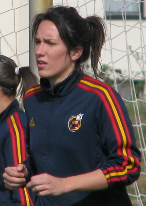 Silvia Meseguer Bellido, spanische Nationalspielerin